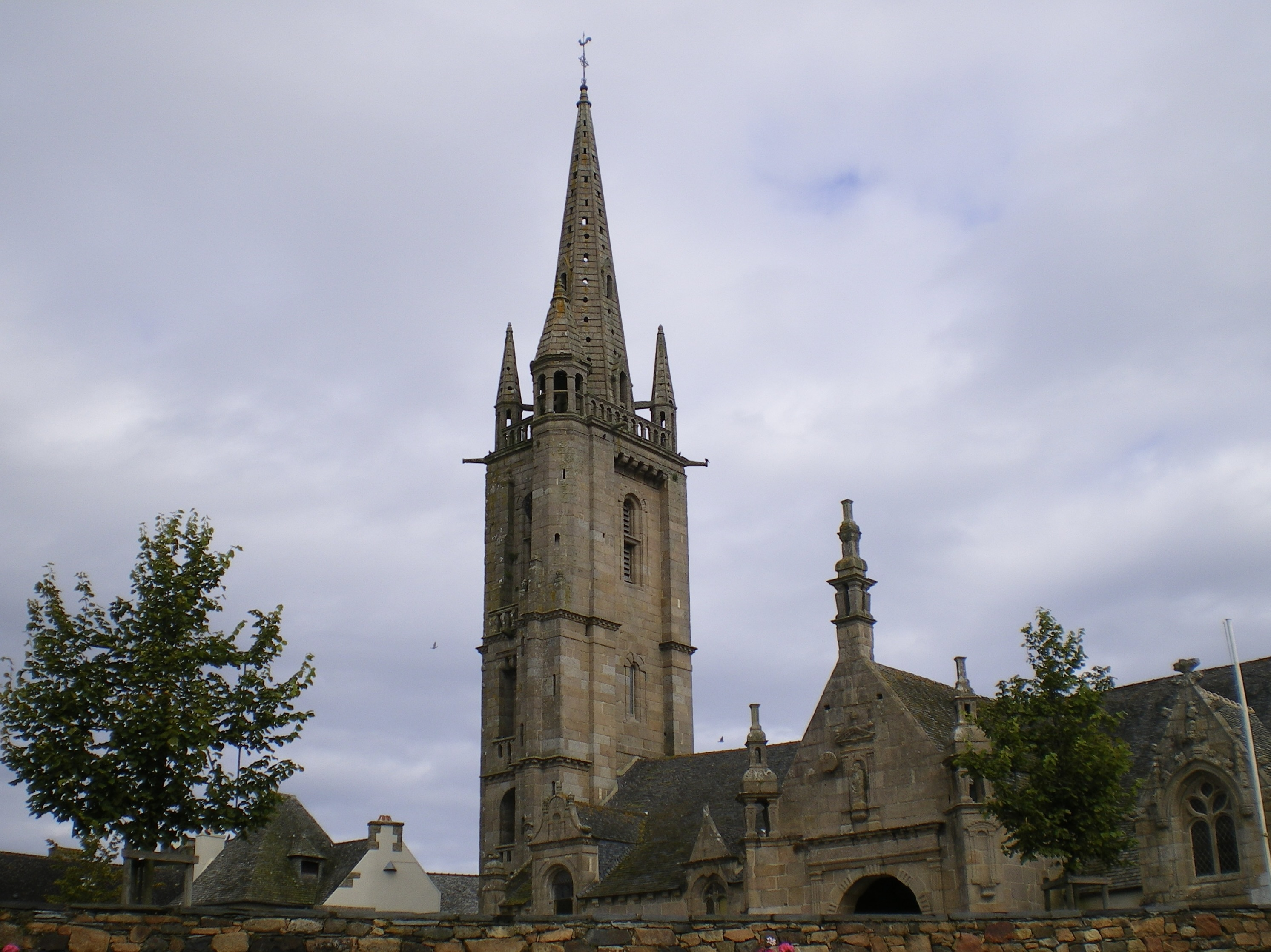 Église de Plougasnou